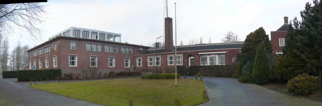 Het hele NERA hoofdgebouw. De foto is samengesteld uit drie foto's en daarom enigszins vertekend.